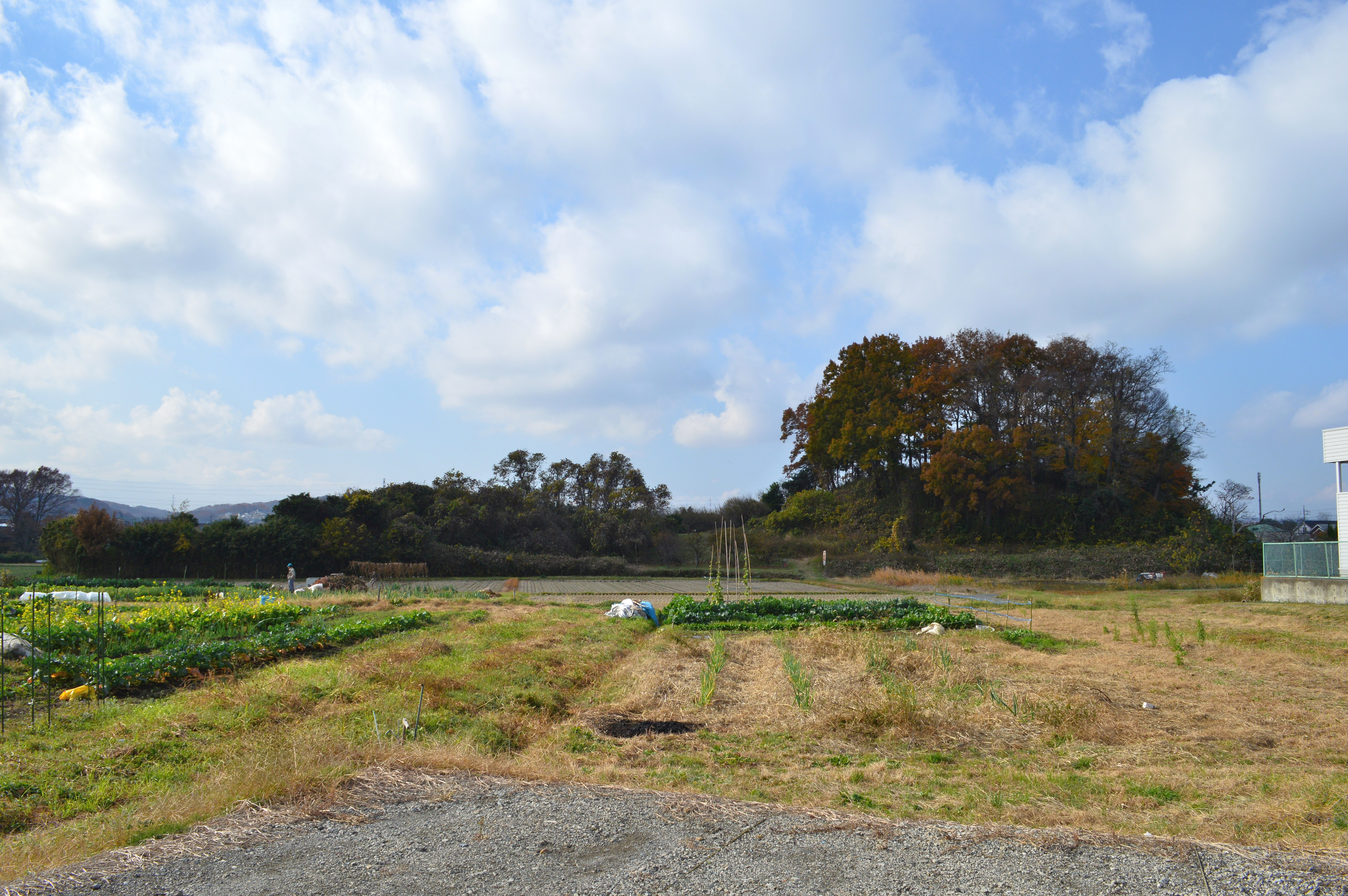 浅間山古墳 (高崎市) 全景